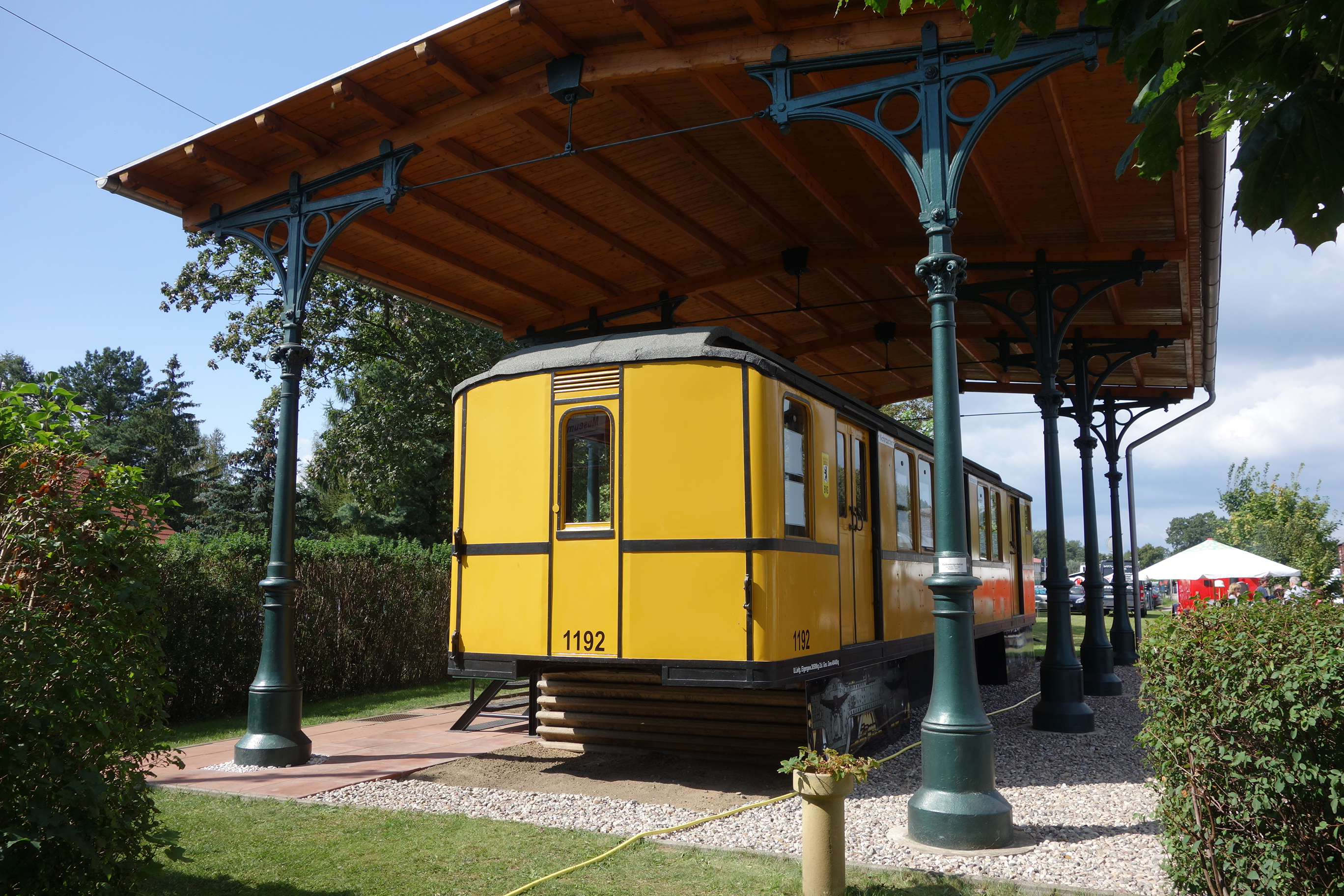 BII-Wagen der Berliner U-Bahn im Bahnhof Rheinsberg (Mark), gusseiserne Säulen des Daches stammen vom Bahnhof Berlin Ostkreuz